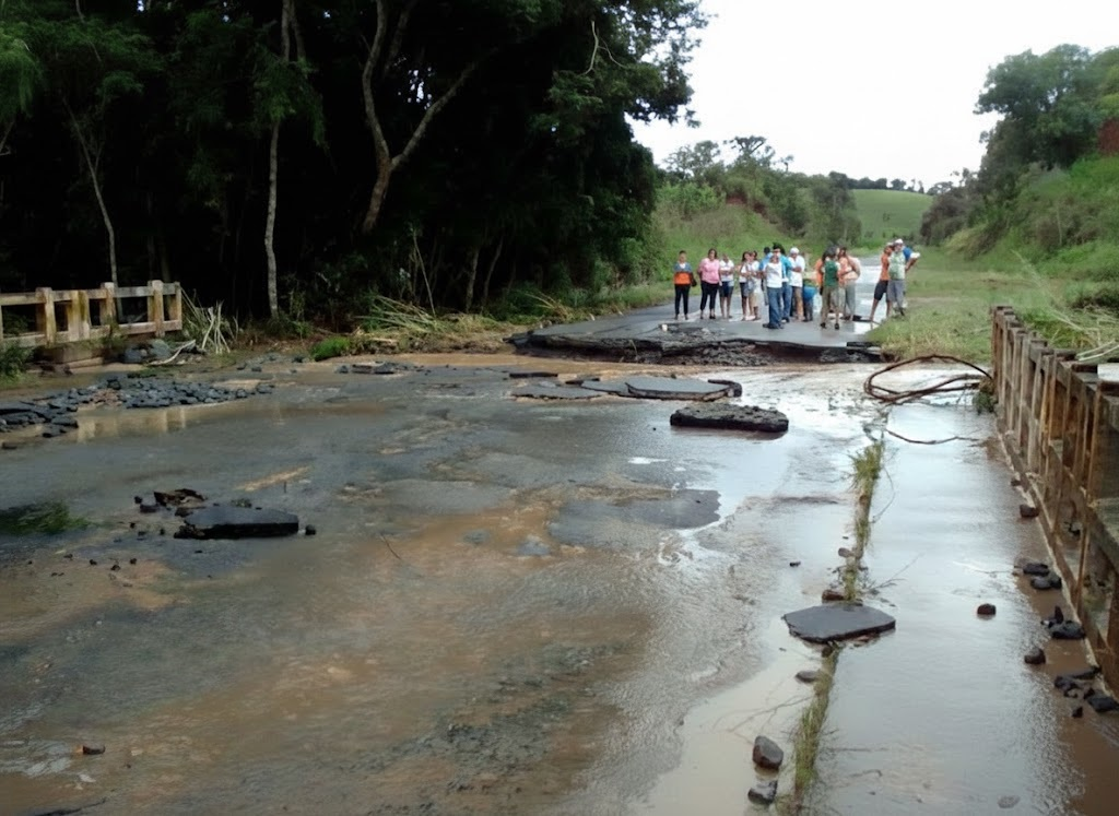 Ponte com a cabeceira estourada devido a enchente do Rio Jacuizinho, km 39 da Rodovia Paulo Virgínio, município de Cunha, Estado de São Paulo, Brasil.